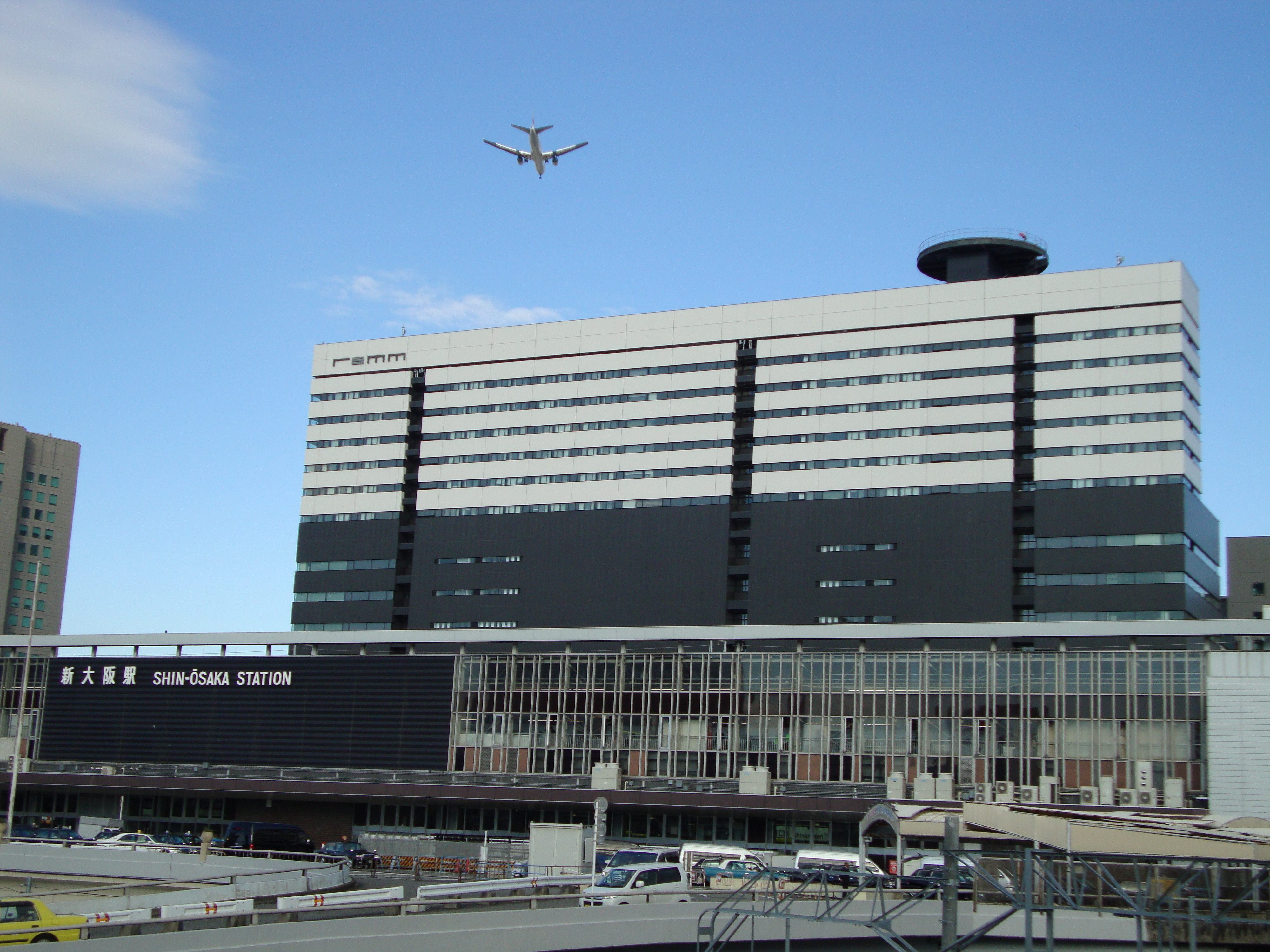 新大阪駅の新しい駅ビル